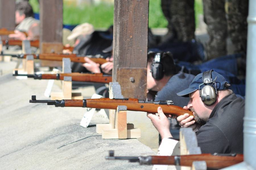 Civilno streljanje s puško M48.